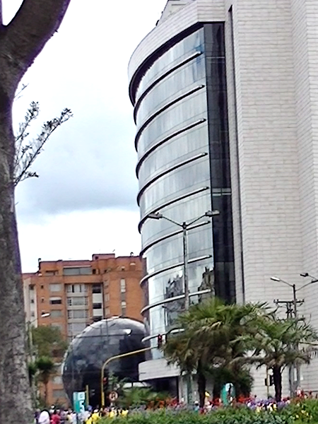 Oficinas de la Contraloría General de la República de Colombia, domingo 28 de julio de 2013